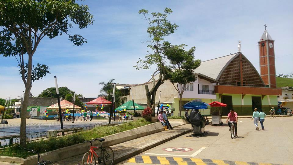 Esta fotografía fue tomada en el municipio colombiano con código 05858.